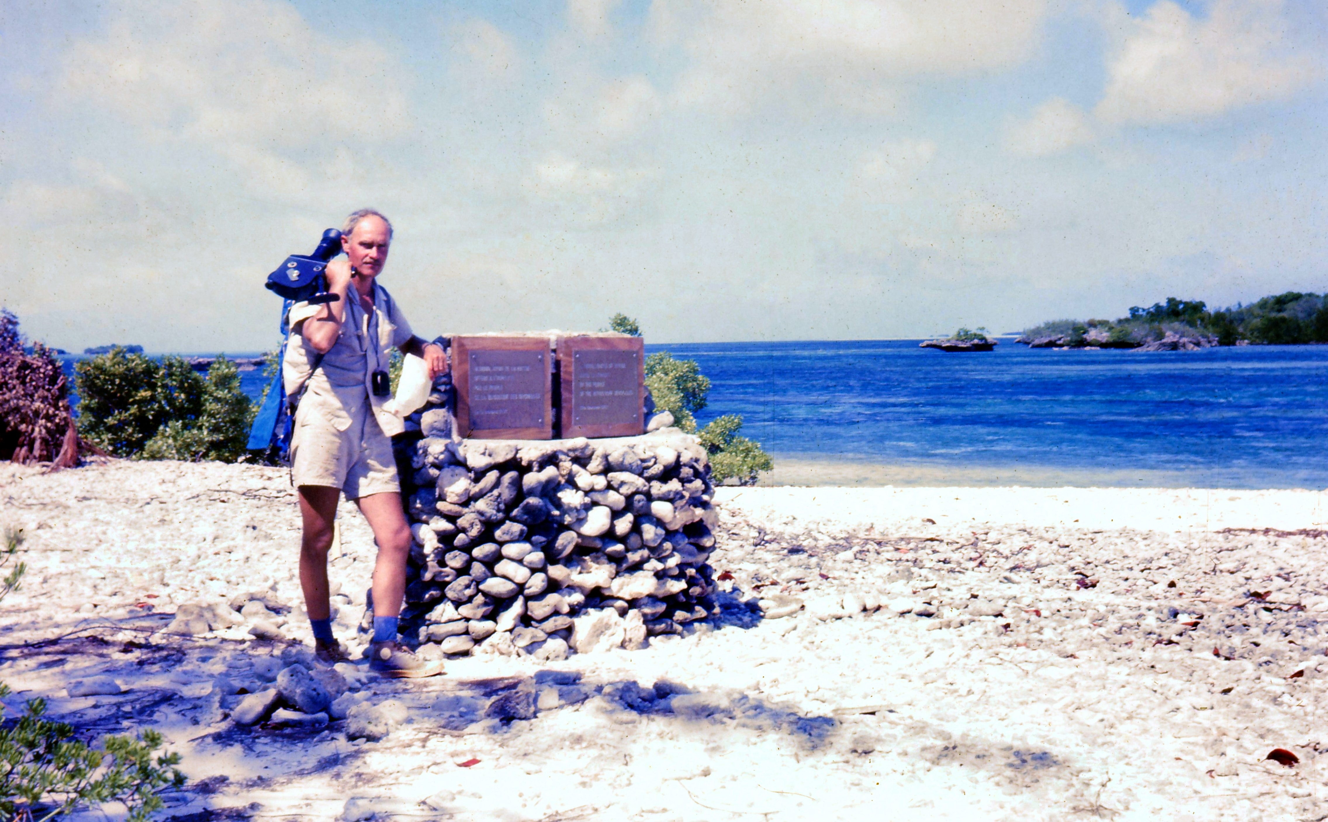 Остров Альдабра - поднятый атолл в архипелаге Сейшельских островов. Здесь находится заповедник и биологическая станция Королевского географического общества. Фотография сделана в 1978 г. во время рейса нис "Академик Петровский" в Индийский океан